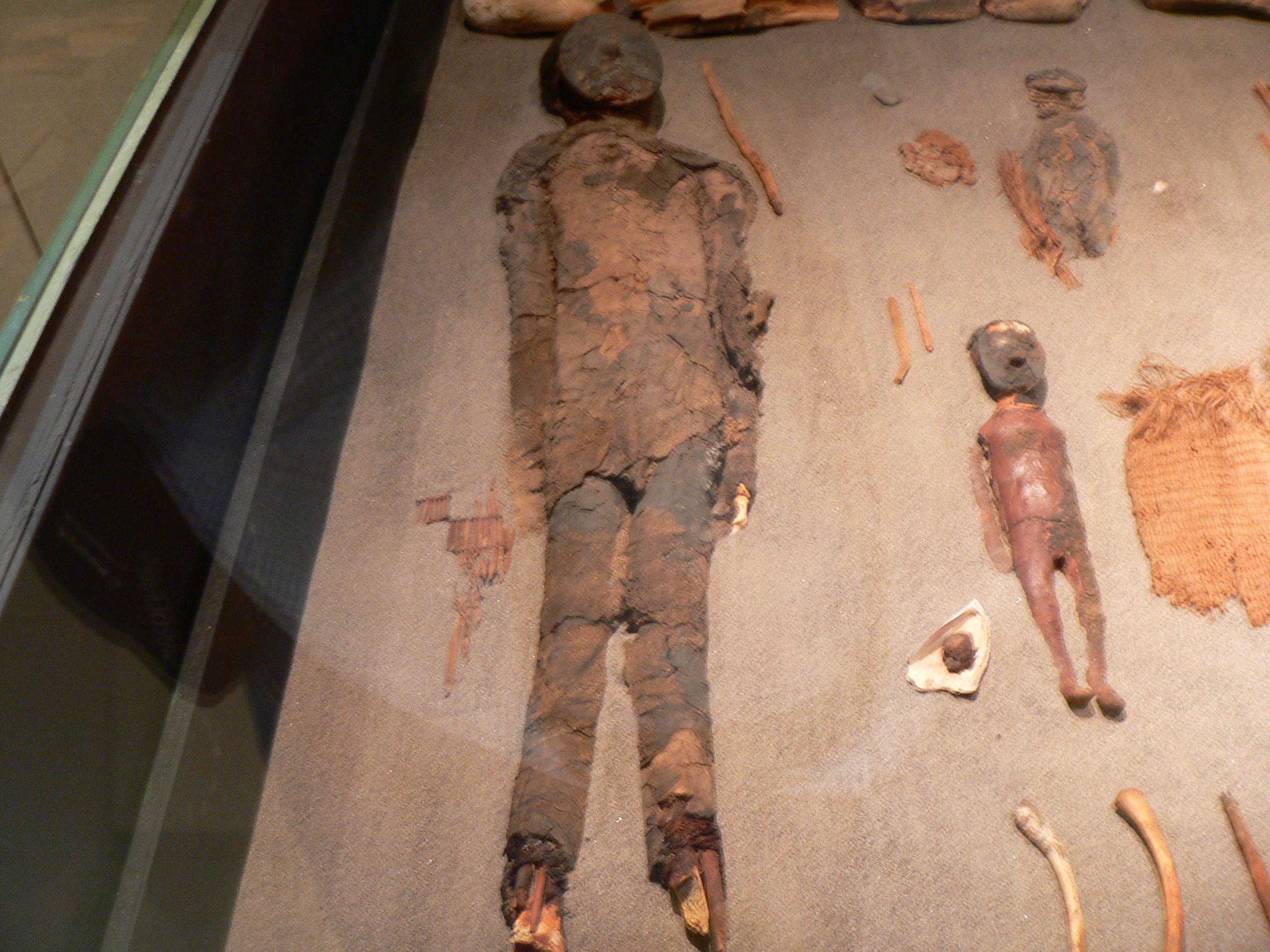 Momia Chinchorro en museo de San Miguel de Azapa, Arica, Chile